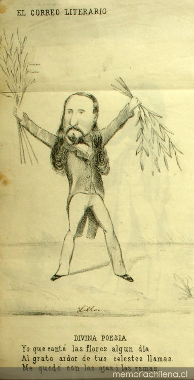 caricatura por antonio smith